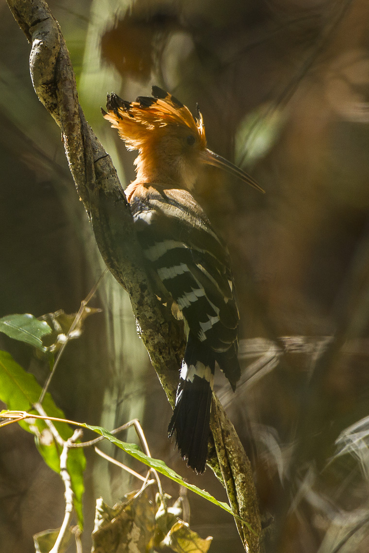 Madagascar Hoopoe - Ankarafantsika - Madagascar_S4E9397